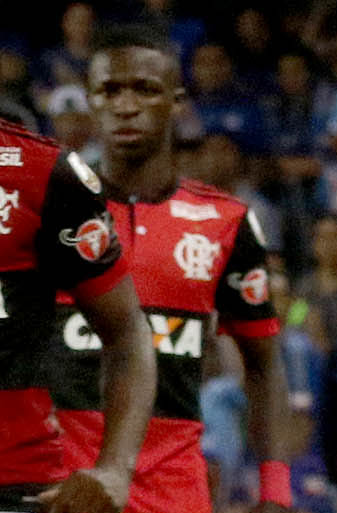 Guayaquil, miércoles 14 de marzo del 2018 (Andes).-En el estadio Capwell en Guayaquil, Emelec enfrenta a Flamengo de Brasil en la segunda fecha del grupo D de la Copa Libertadores. Vinicius Júnior Foto:Andes/César Muñoz